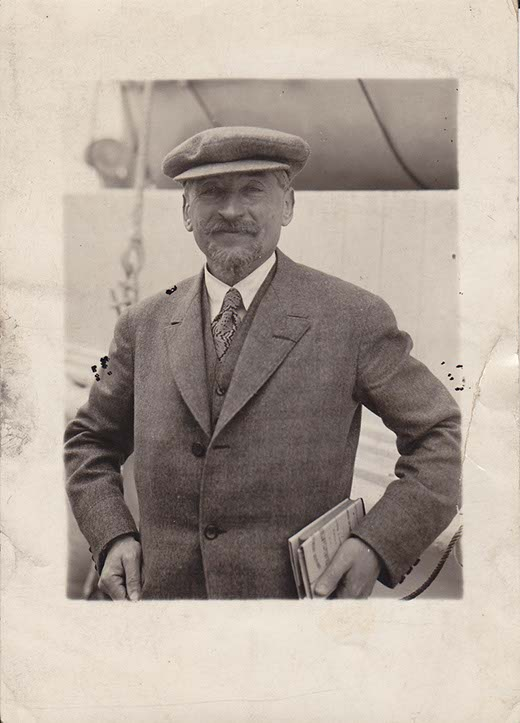 Portrait de Léon Rosenthal